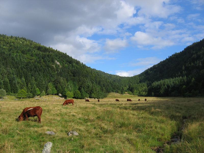 Vallée glaciaire du Fossat dans le haut-Forez. Cette vallée taillée dans un massif granitique, comporte des blocs erratiques, un fond argileux supportant des tourbières, des falaises abruptes cachées sous la forêt.